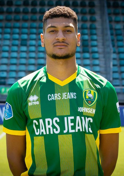 Bjørn Johnsen